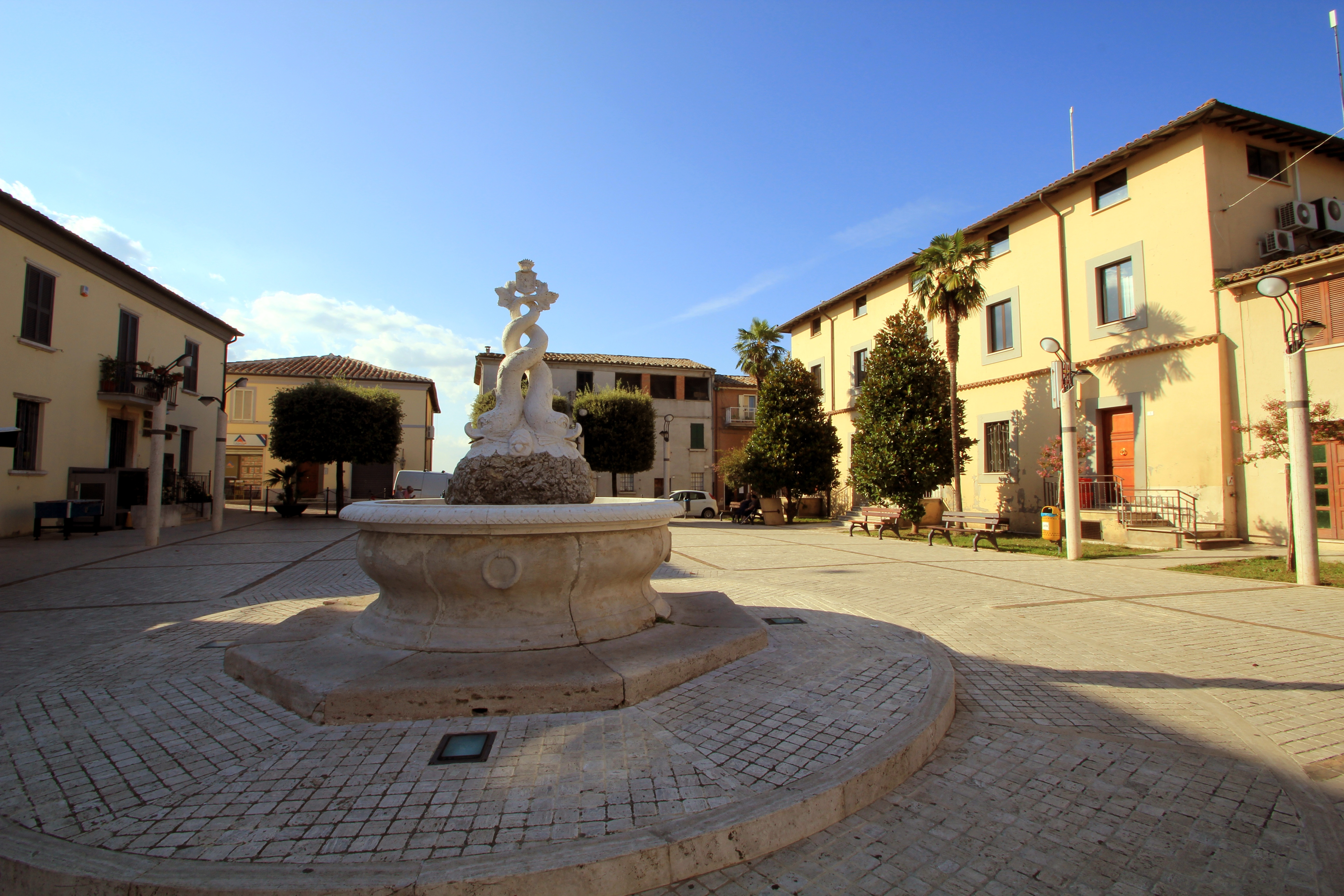 Piazza Vittorio Emanuele II in Attigliano (TR)